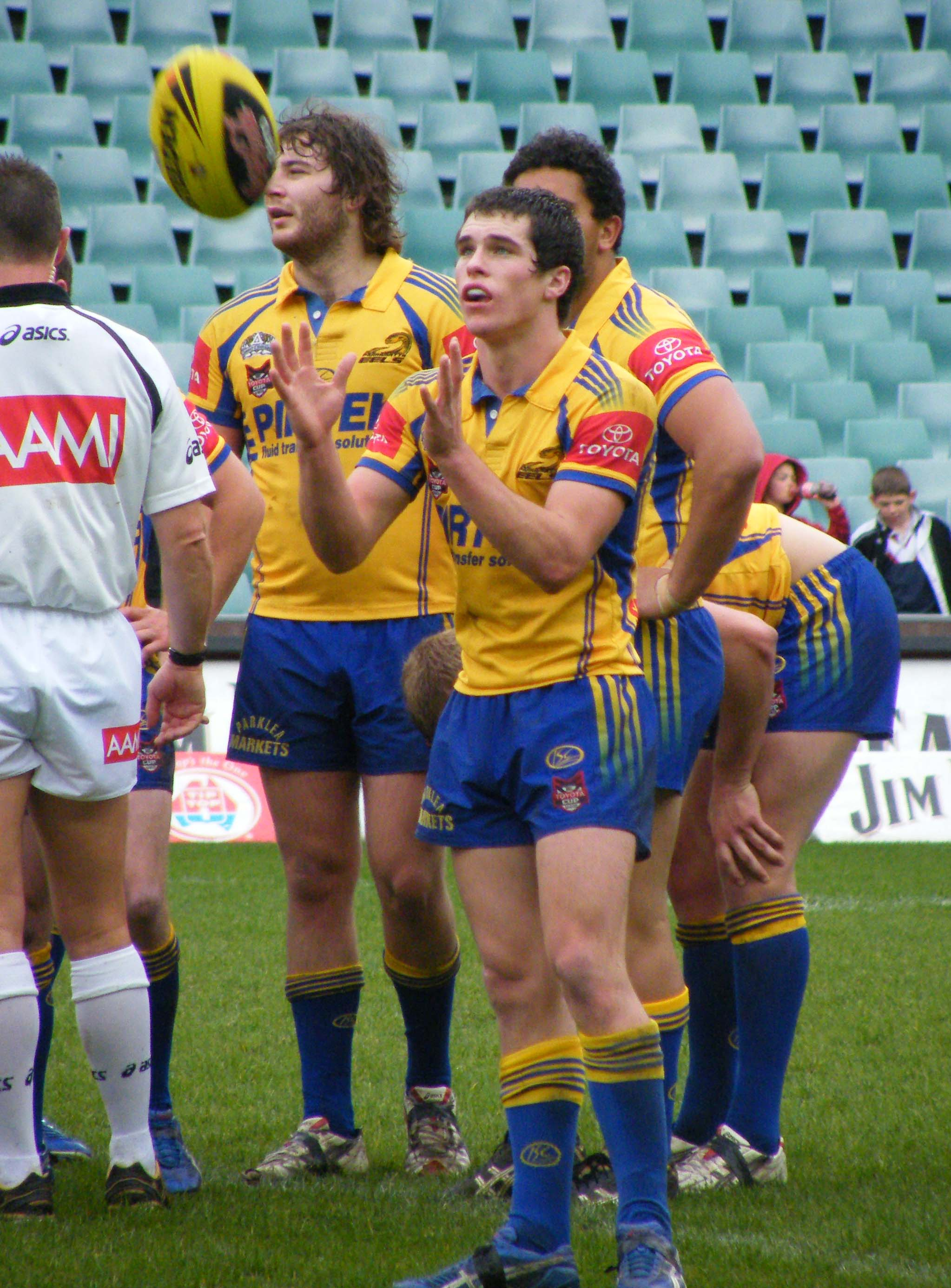 Parramatta Toyata cup half Daniel Mortimer.